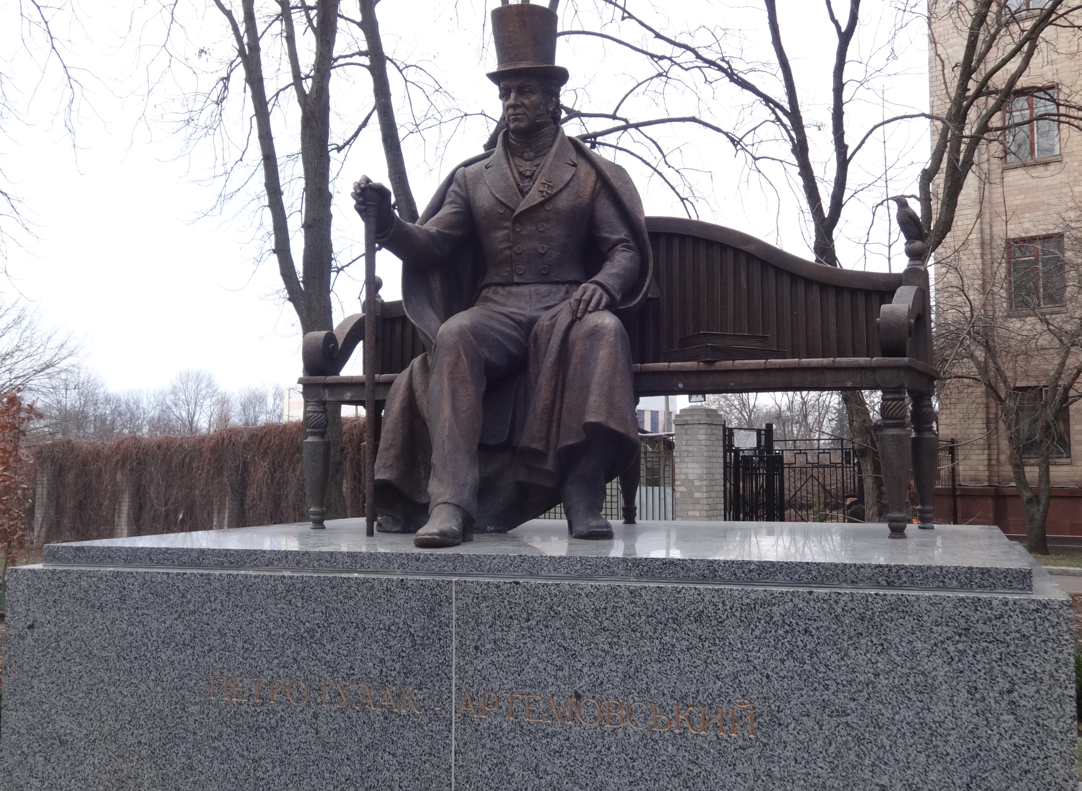 Пам'ятник класику української літератури 19 століття Петру Гулаку-Артемовському відкрито на честь 213-річчя з дня заснування Харківського національного університету.